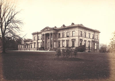 Die Fotografie zeigt das Blythswood House (Glasgow)im Jahr 1870